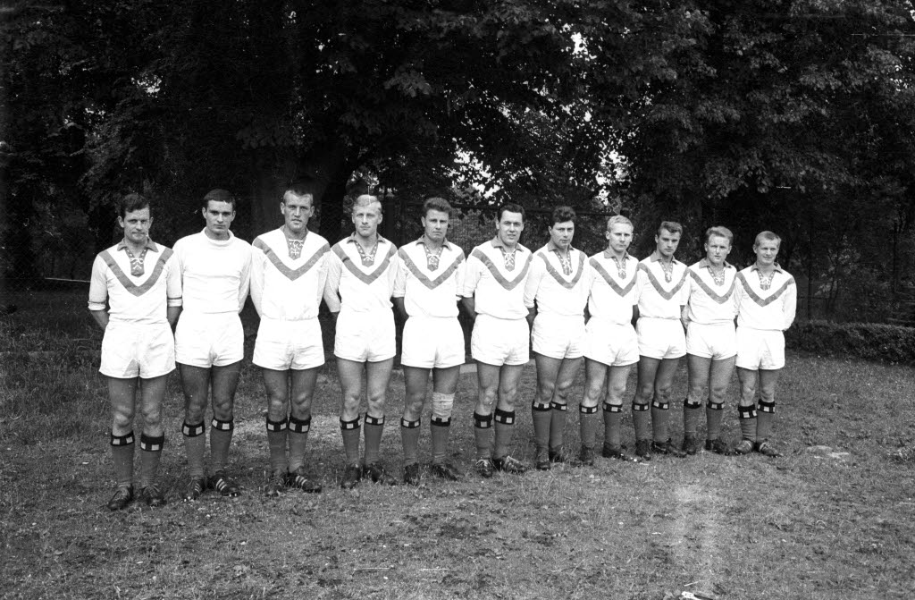 im Stadion Waldwiese an der Hamburger Chaussee. Die Mannschaft stieg am 26.06.1966 durch ein 3:0 über den TSV Bargteheide in die 1. Amateurliga auf.